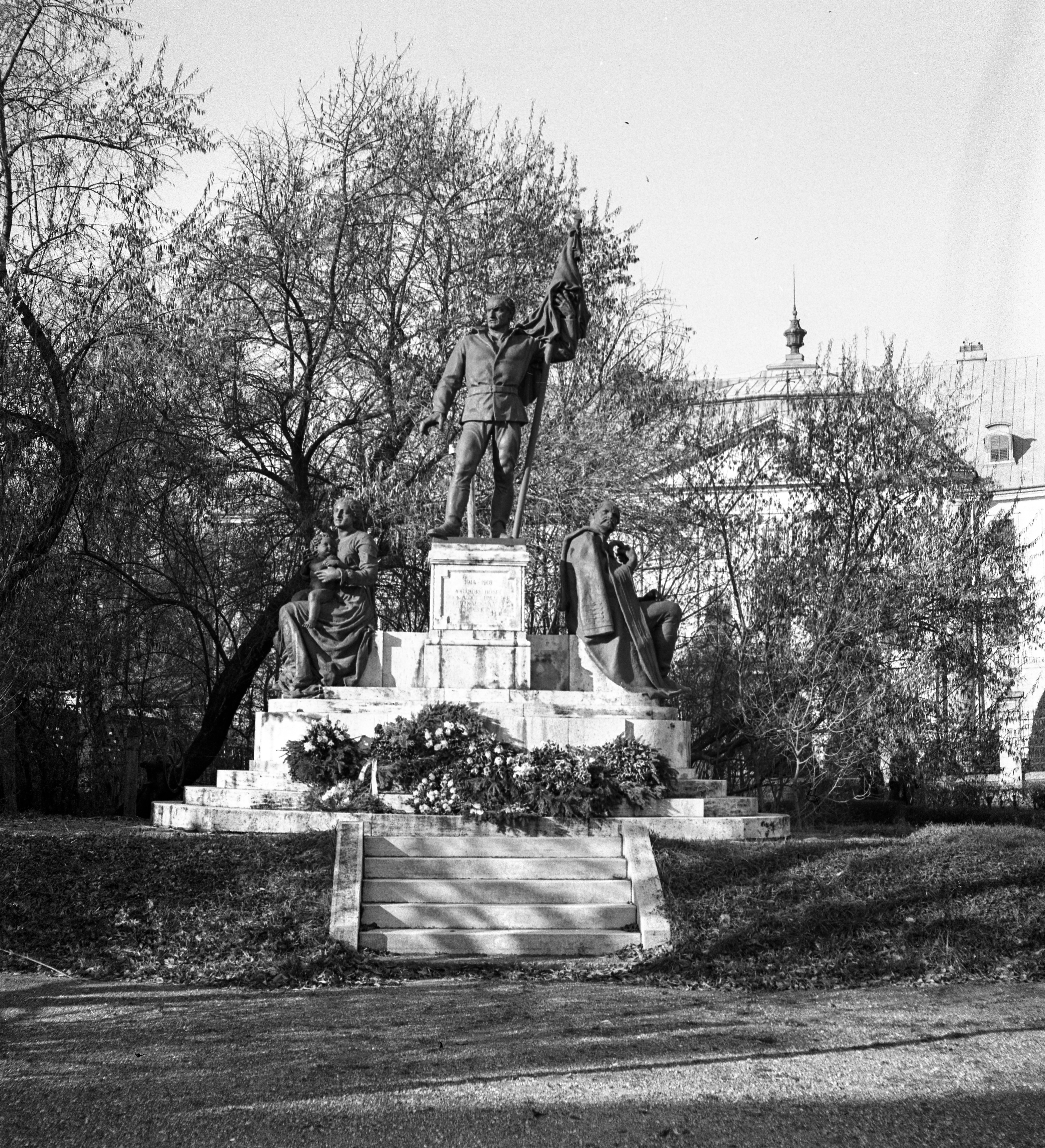 Szentháromság tér, Hősi emlékmű (Sidló Ferenc, 1930.). Location: Hungary, Kalocsa Tags: monument Title: Szentháromság tér, Hősi emlékmű (Sidló Ferenc, 1930.).